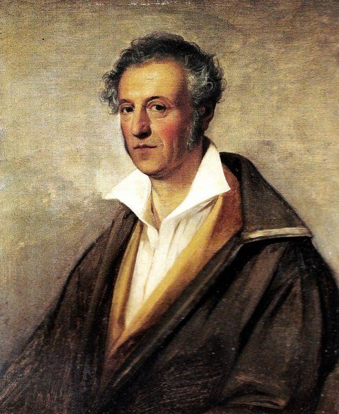 Ritratto dello scultore Antonio Bosa, olio su tela